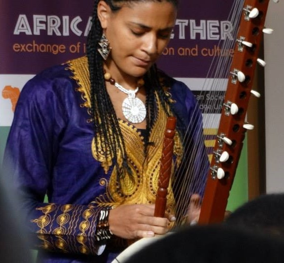 Musician and composer Sona Jobarteh playing the kora during the event "Africa Together" commemorating Africa Day in the university of Cambridge, on May 23rd 2014.